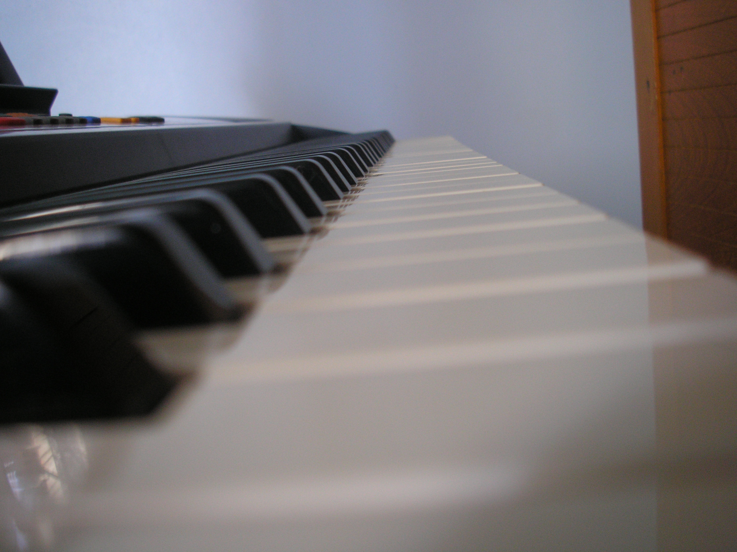 Foto plainada de um teclado, da marca Yamaha PSR240.